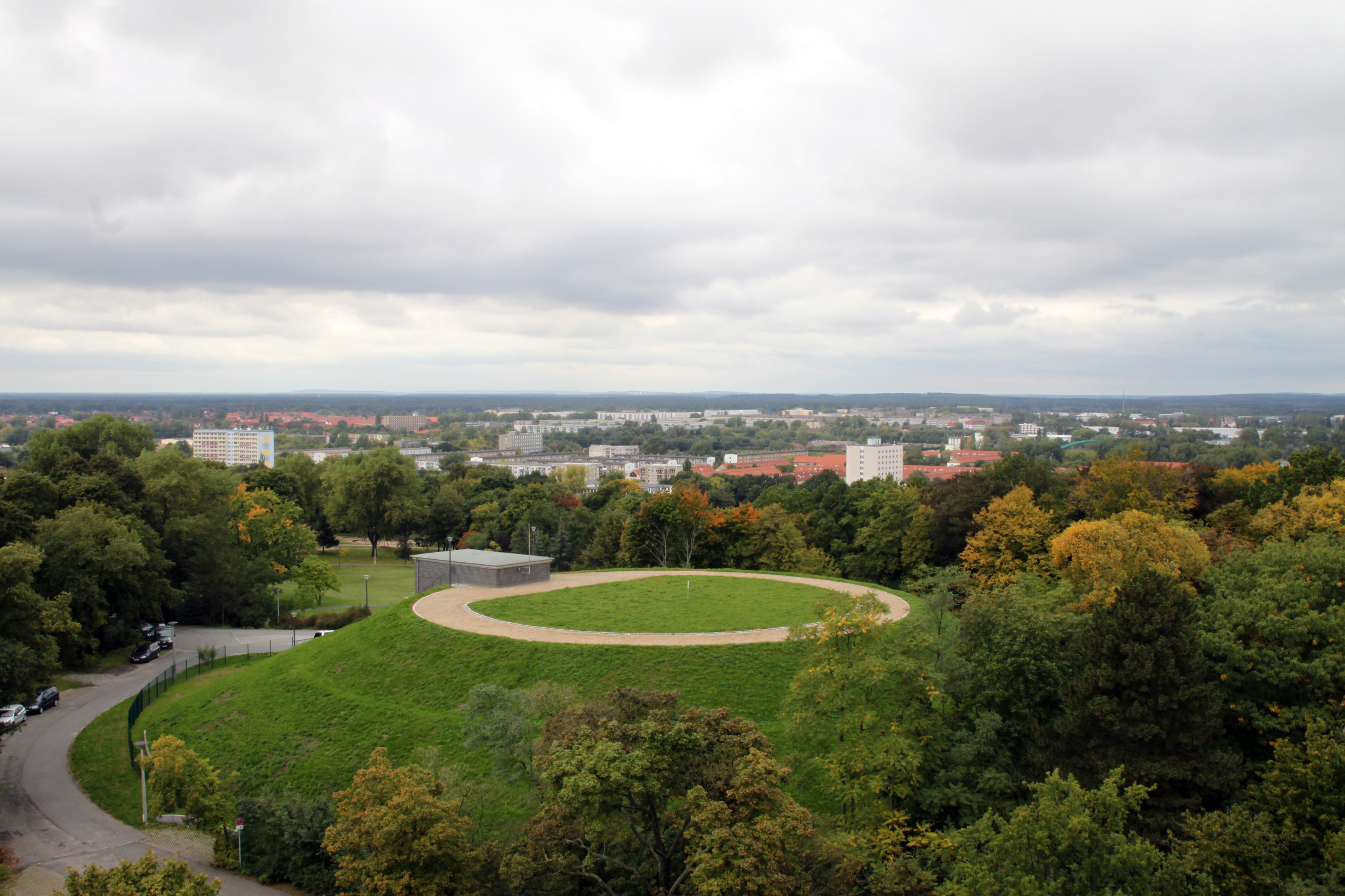 Der Brandenburger Stadtteil Nord vom Marienberg aus gesehen. Zu erkennen ist links im Bild das sogenannte Buchhochhaus aus dem Jahre 1977